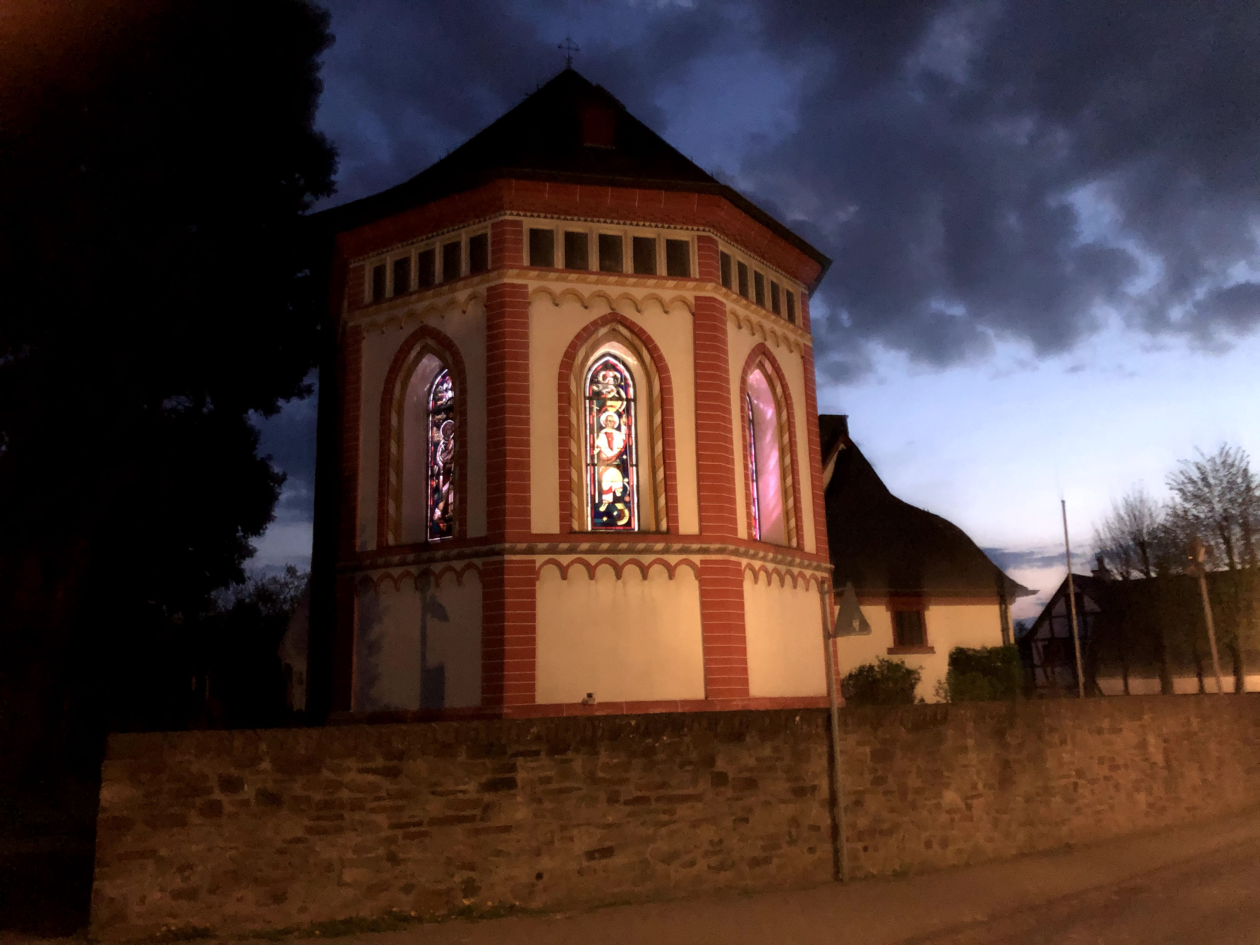 Hoffnung des Lichtes : Beleuchter Chor